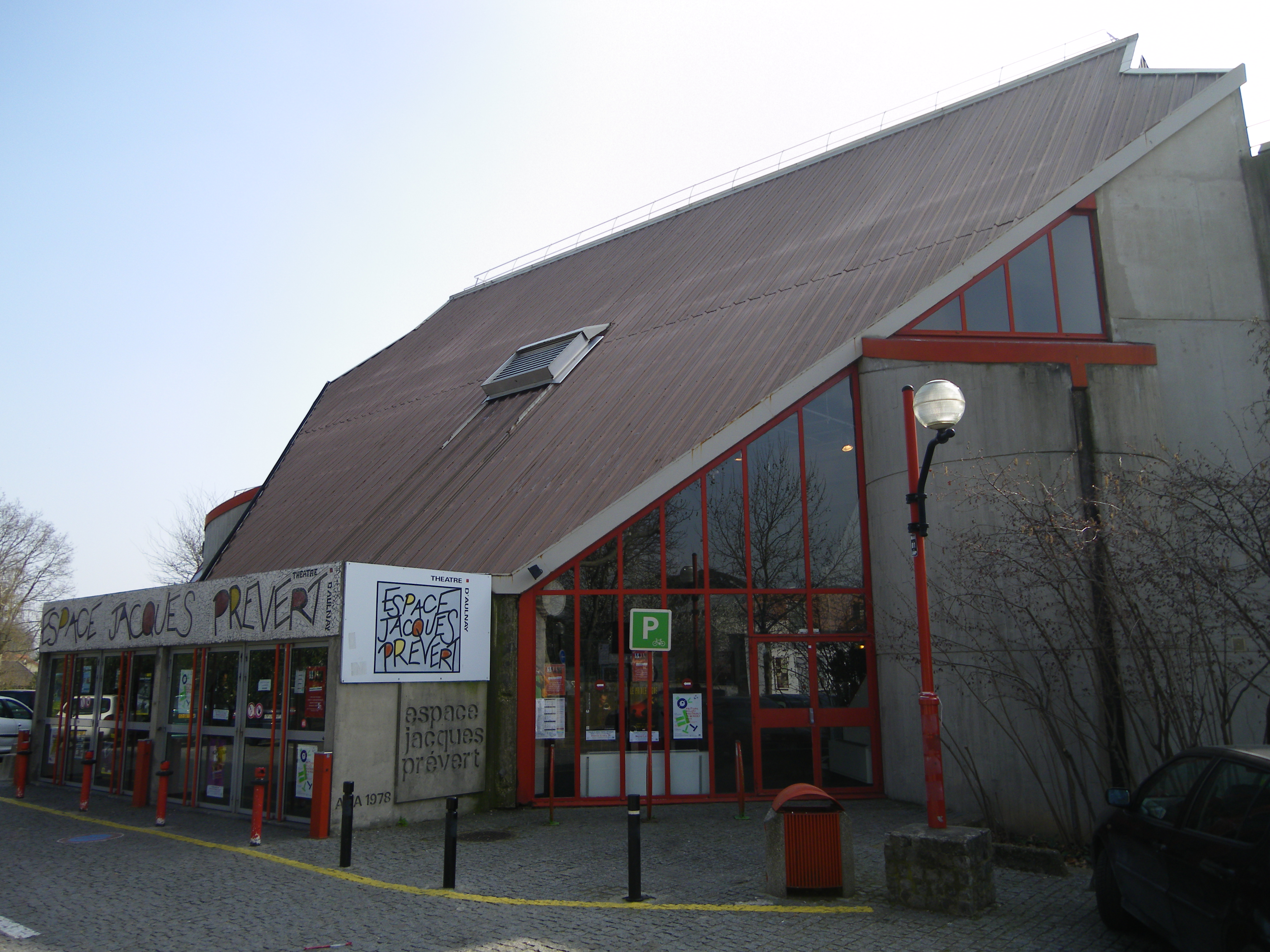 espace jacques prévert aulnay sous bois